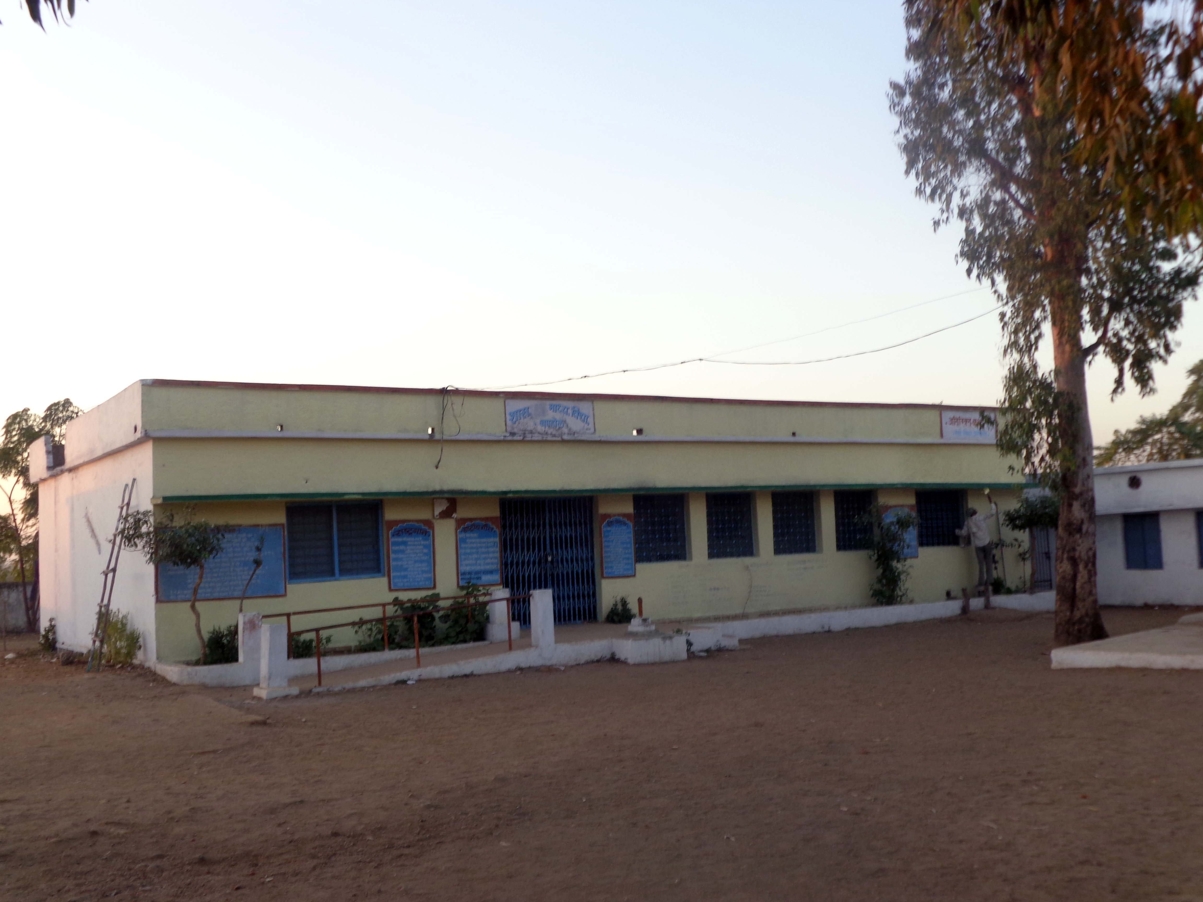 hi:बंडोल: शासकीय माध्यमिक विद्यालय बंडोल स्थापना वर्ष 1964